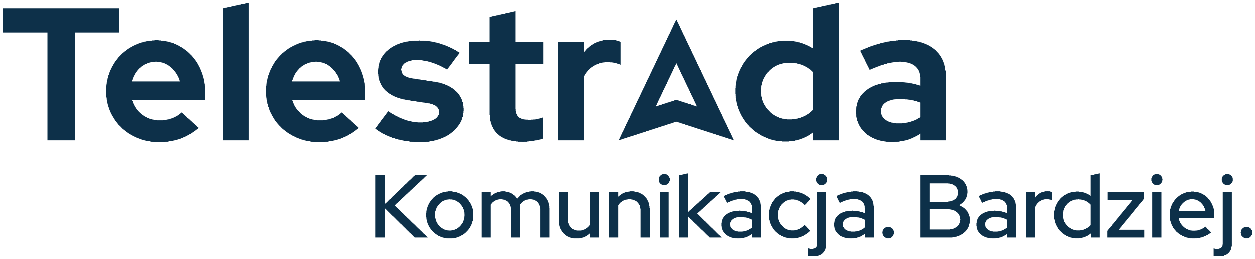 Nowe logo Telestrada S.A.